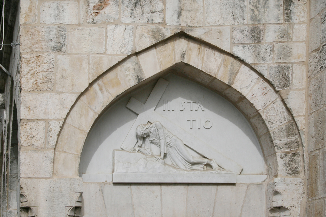 Station III du Chemin de Croix Via Dolorosa à Jerusalem